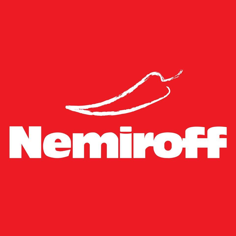 Это официальный логотип компании Nemiroff